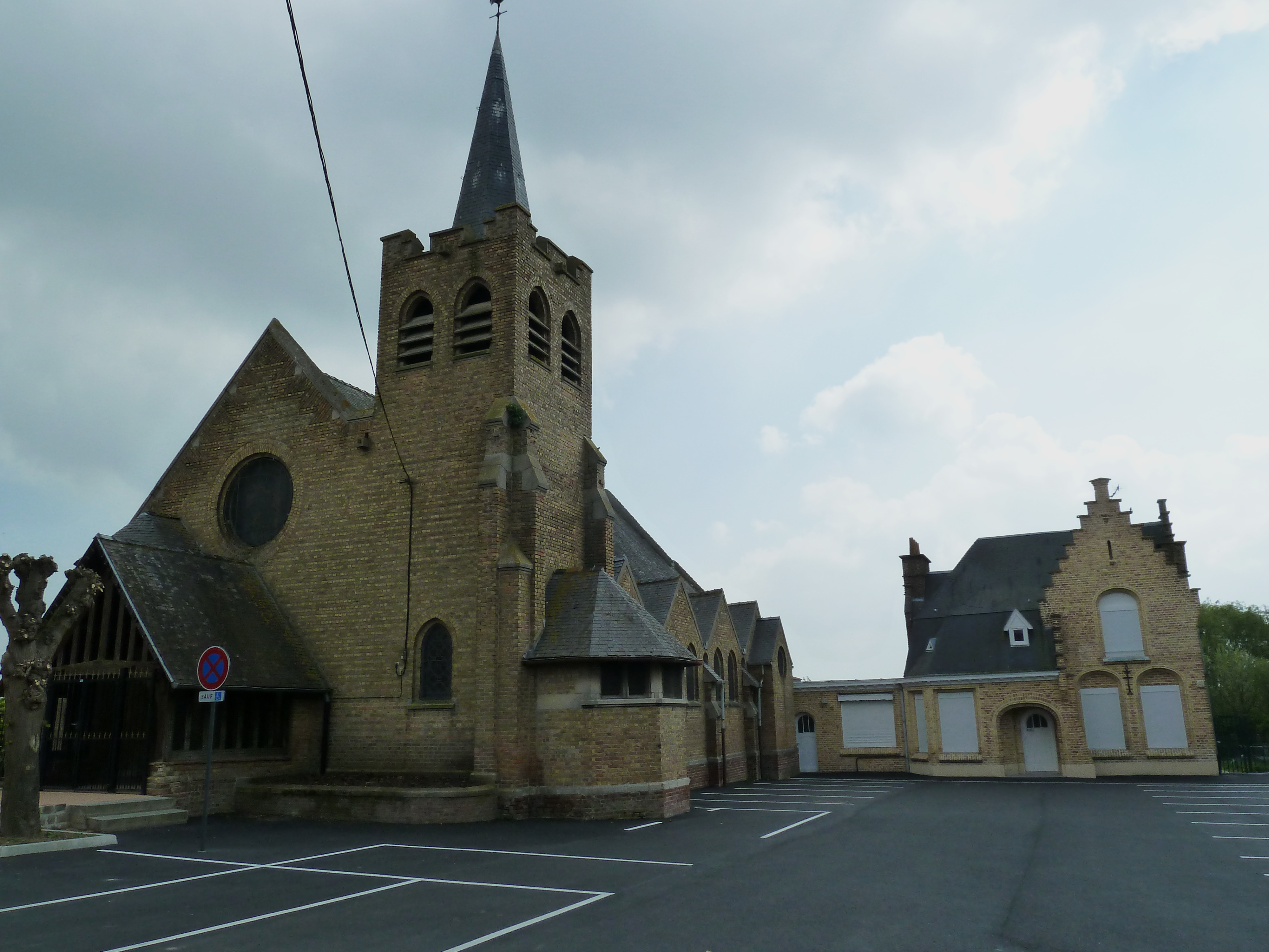 L'église St Amand à Outtersteene Bailleul Nord, France